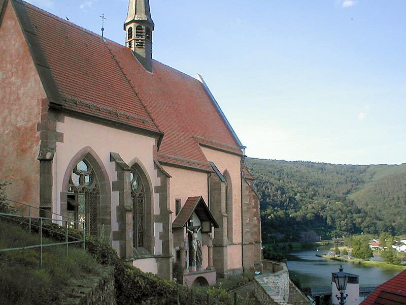 Karmeliter-Klosterkirche Märiä Verkündigung in Hirschhorn (Neckar)